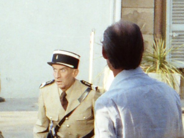 Louis de Funès dans le rôle de Ludovic Cruchot lors du tournage du film Le Gendarme et les Extra-terrestres, près de la gendarmerie de Saint-Tropez, en 1978. On aperçoit Jean Girault, réalisateur du film, de dos, observant son acteur.